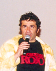 Fernando Larraín, Benjamín Vicuña, Nicolas López, entre otros; Película Promedio Rojo; año 2004